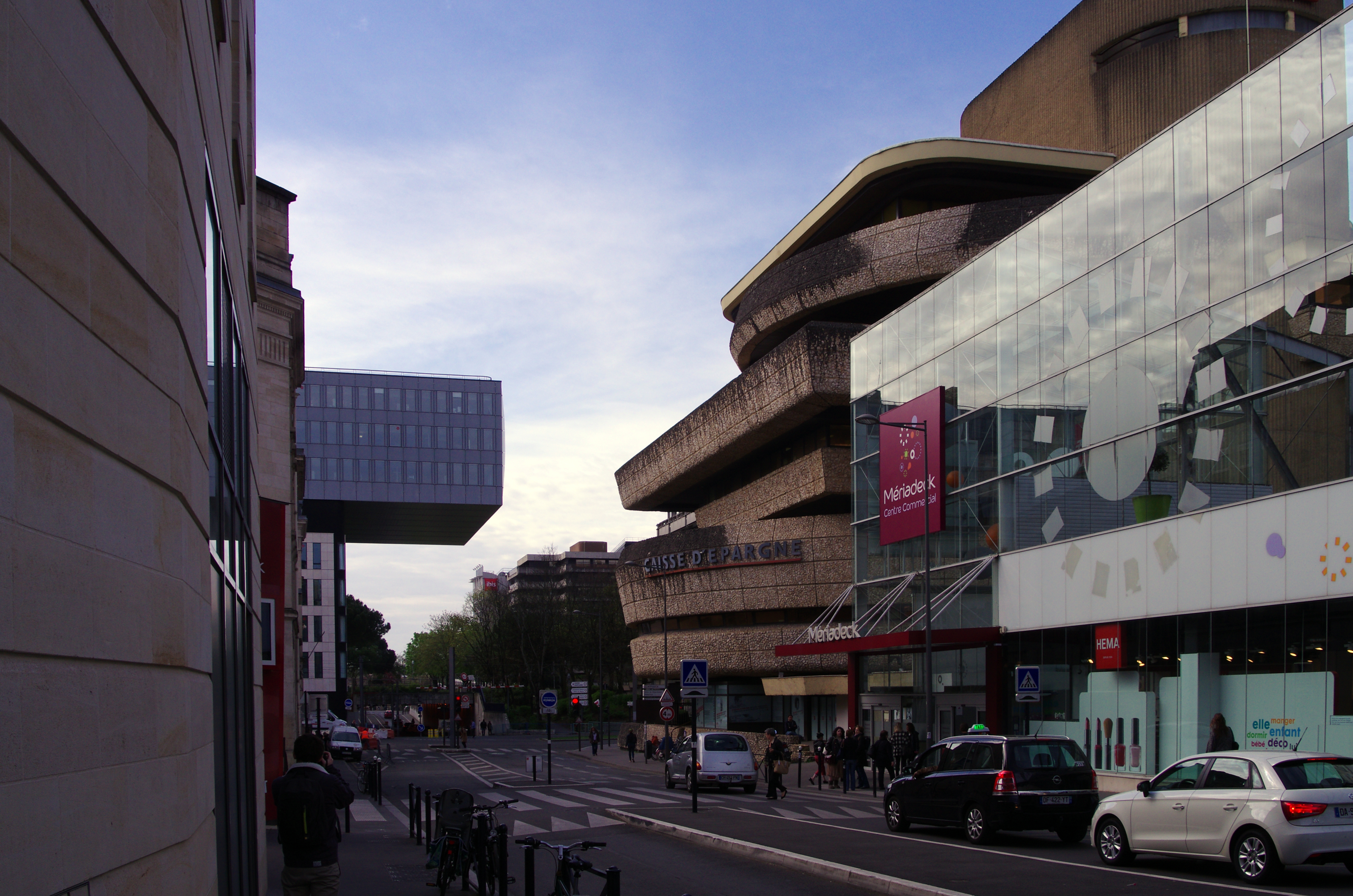 Bâtiment Conçu par Edmond Lay et classé monument historique